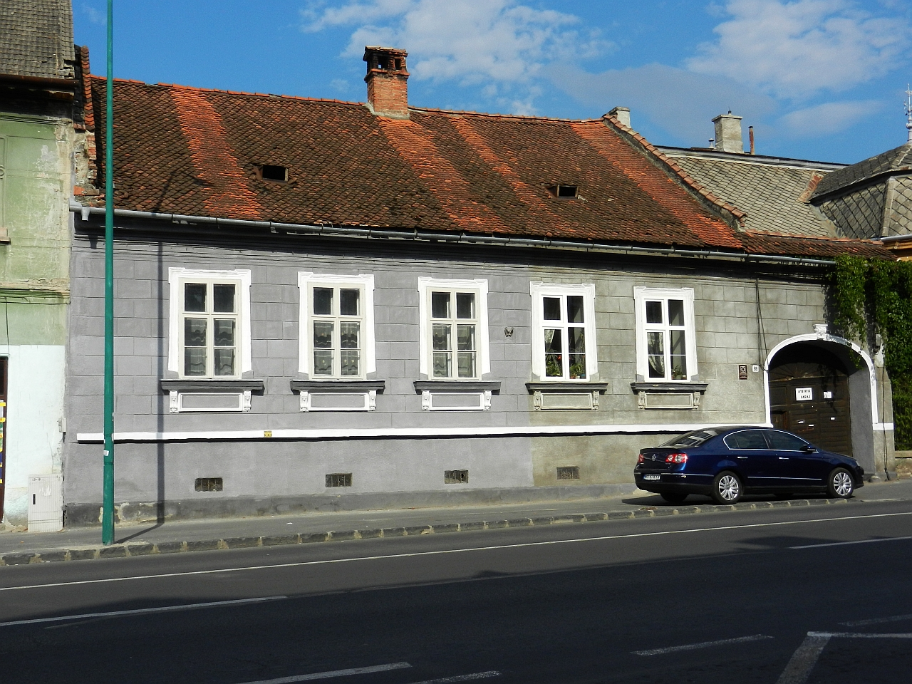 Casa monument istoric (Lunga 86)